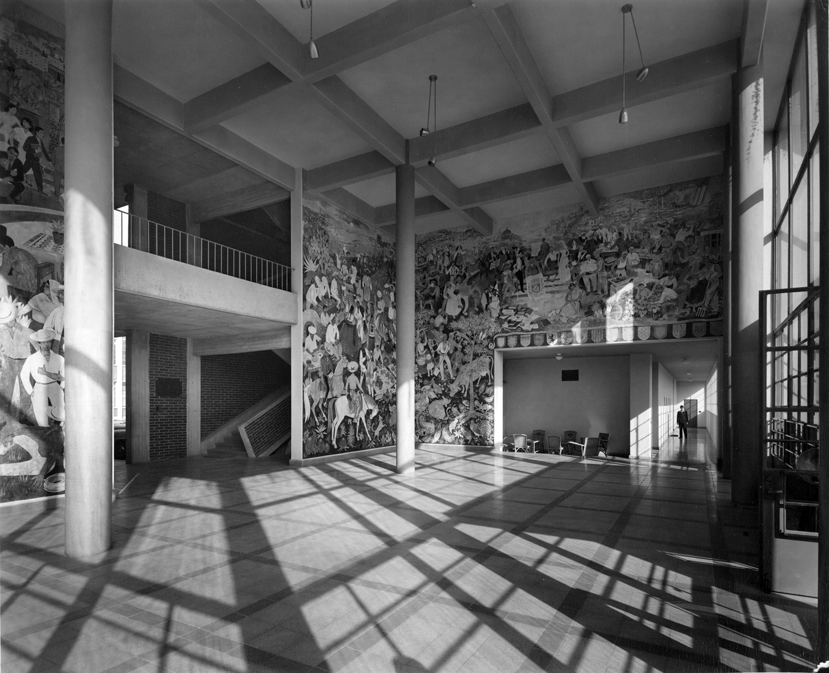 Lycée Franco-Mexicain